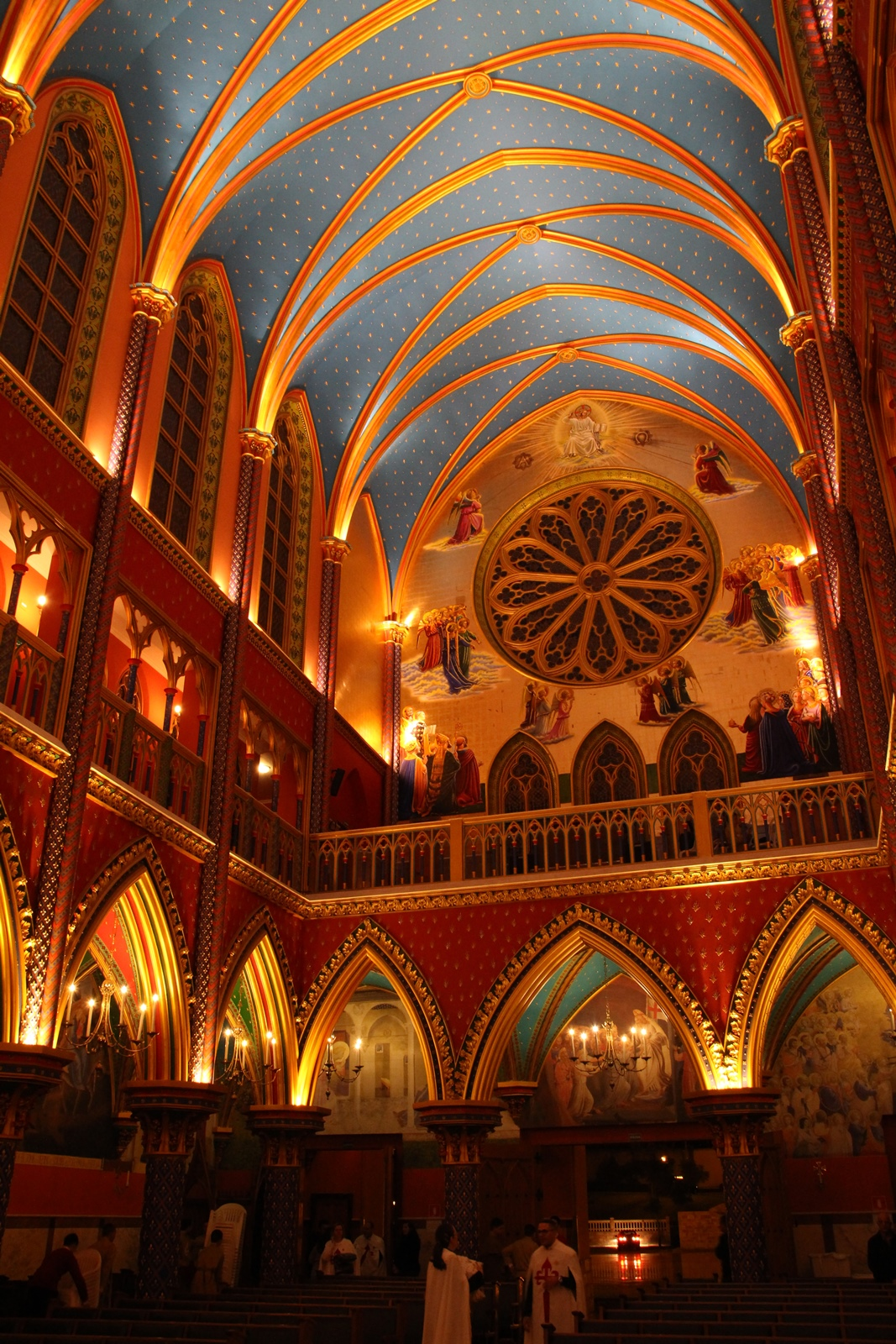 Construída pelos Arautos do Evangelho desde 2006, em Cotia-SP